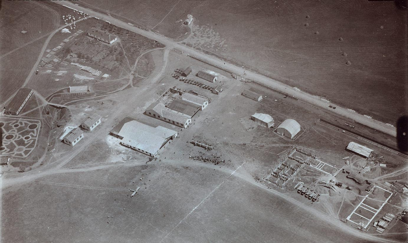 Luftaufnahme des Flugplatzes im Dorf Bozhurishte bei der Grundsteinlegung der Flugwerft, Juni 1917